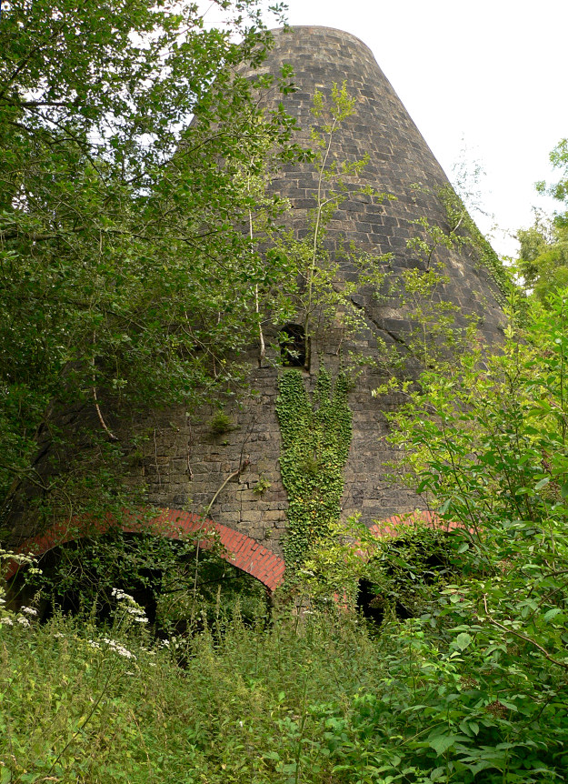 Glasschmelzofen Steinkrug